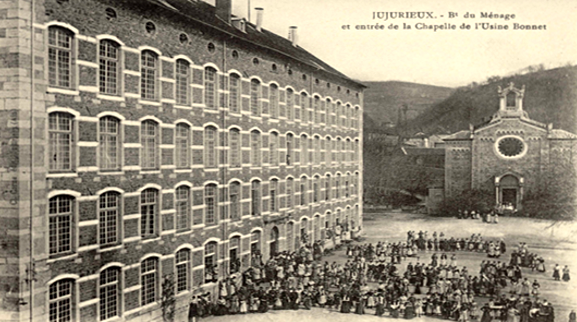 Soieries Bonnet, vers 1910